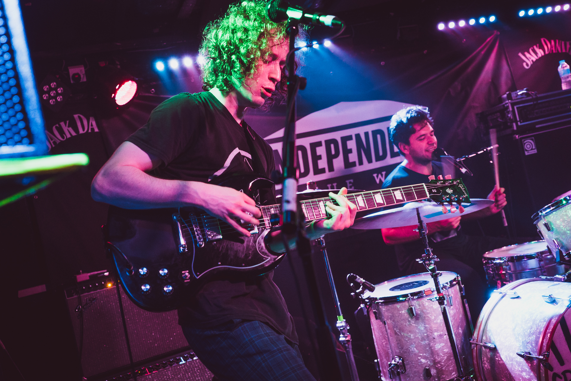 Die britische Band Spring King bei einem Auftritt in 2016.